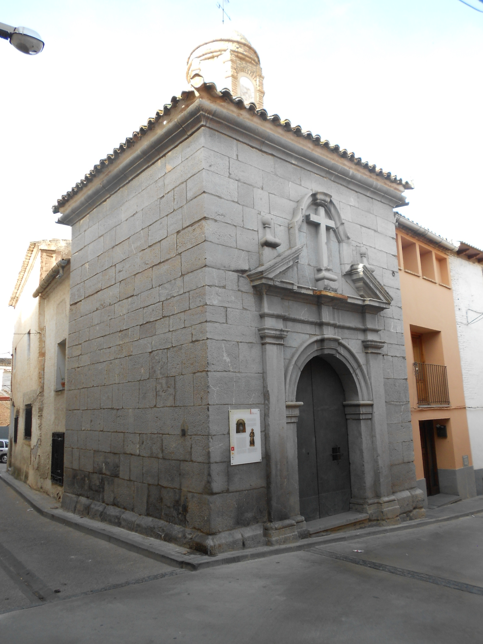 Capilla del Santo Cristo (Calatorao, España)